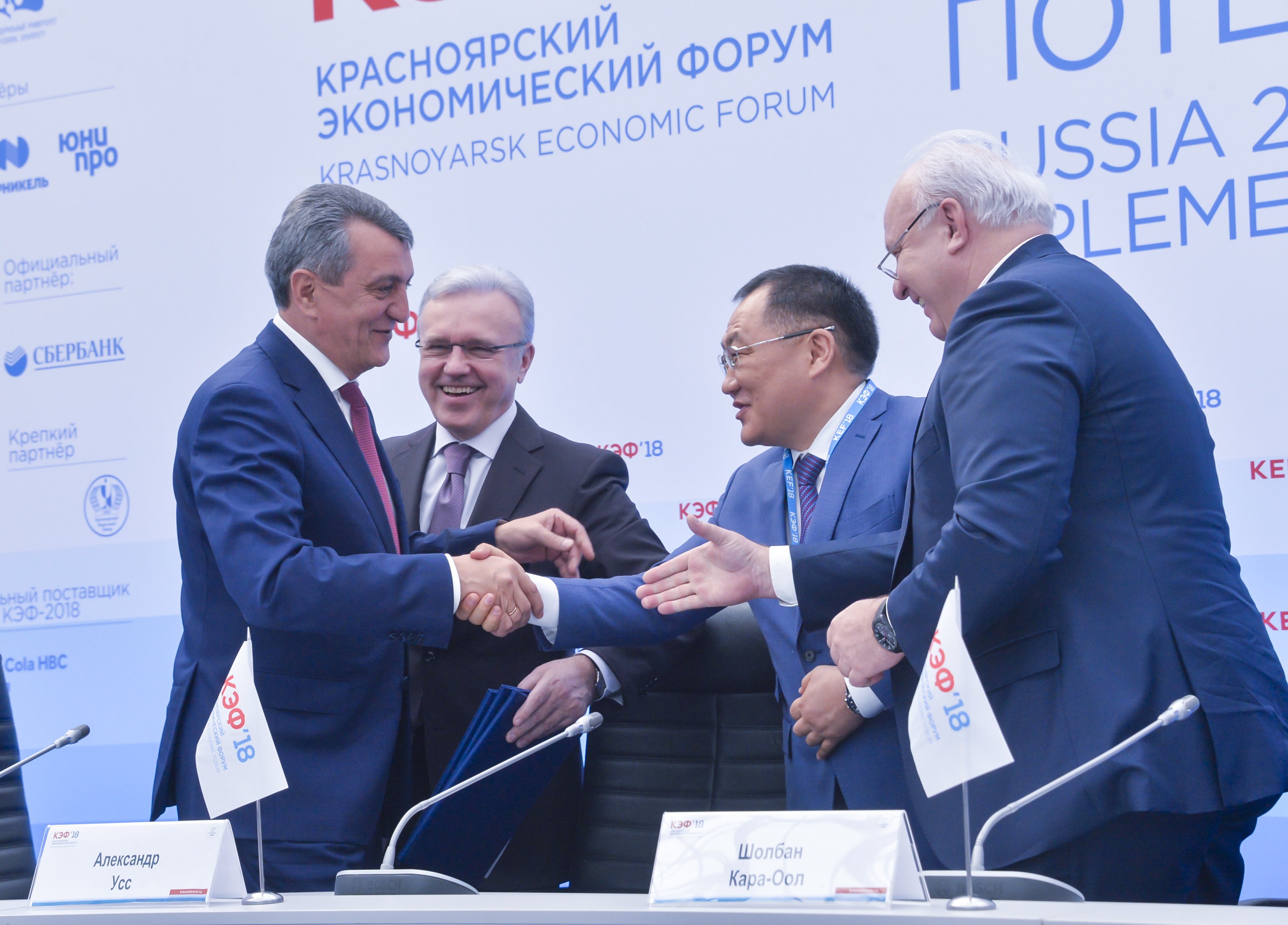 Главы трех субъектов и полномочный представитель президента России в СФО: Шолбан Кара-оол, Александр Усс, Виктор Зимин и Сергей Меняйло.